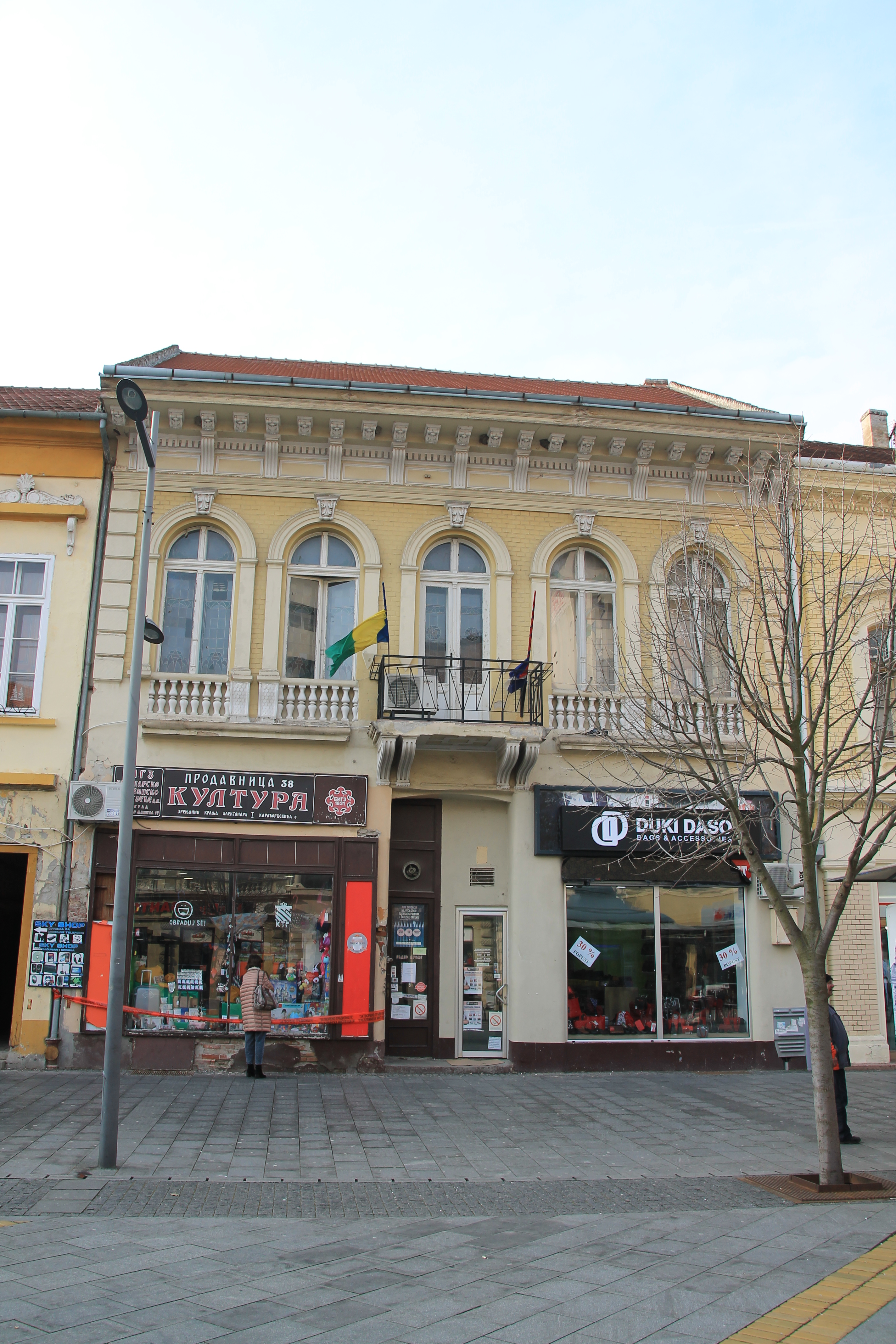 Staro jezgro Zrenjanina